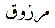 Марзук